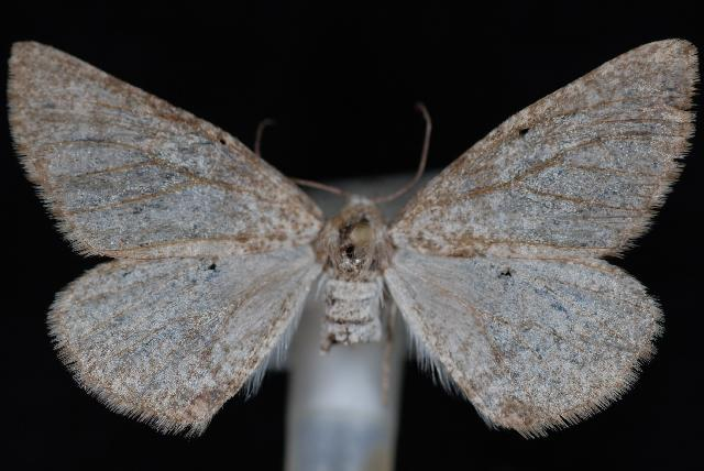 Meris suffusaria